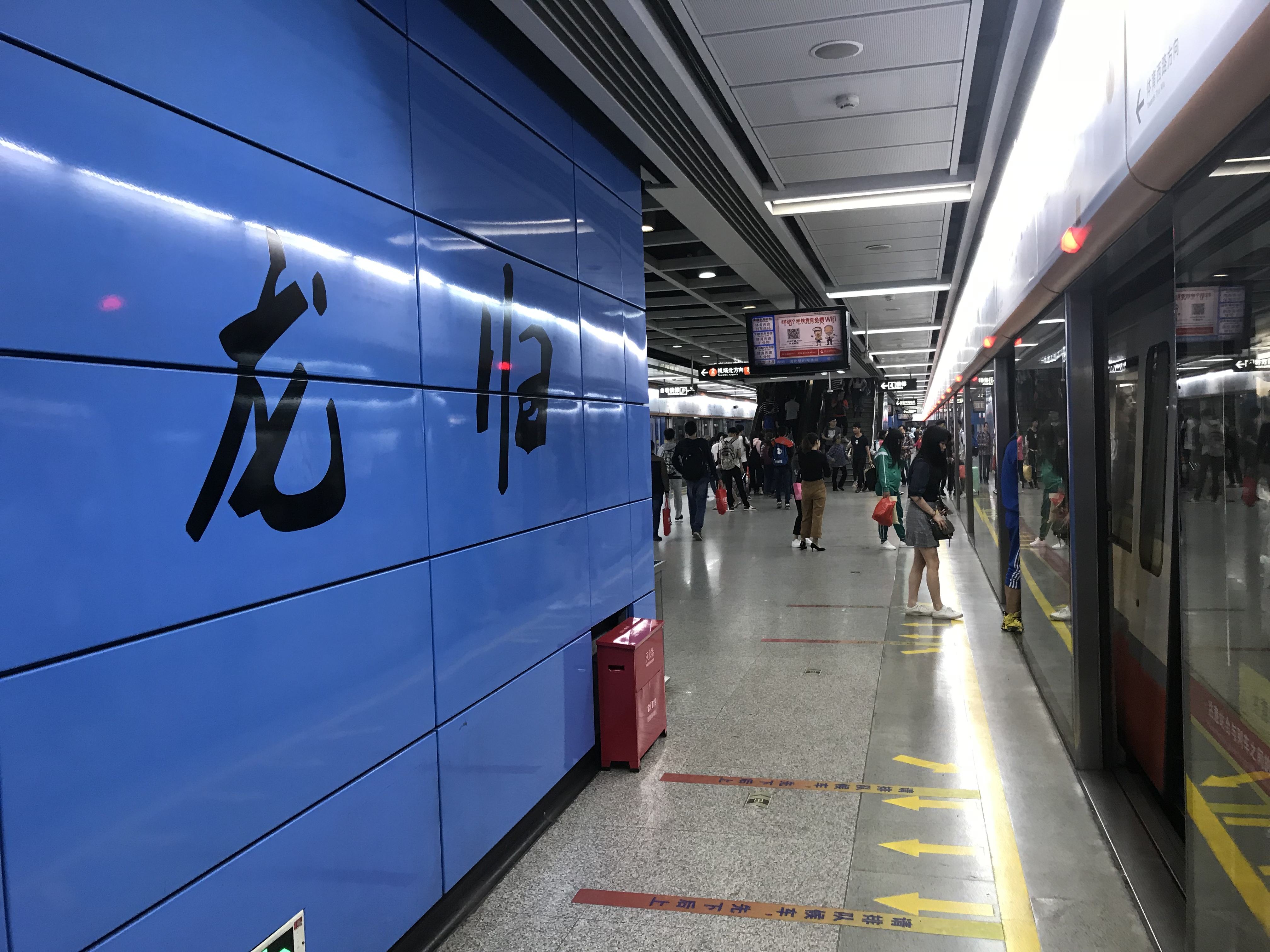 广州地铁龙归站